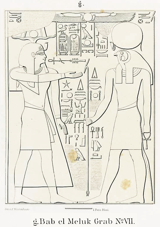 Reproducció d'un dels relleus de la tomba de Ramsès II (KV7). De l'obra Denkmaeler aus Aegypten und Aethiopien nach den Zeichnungen der von Seiner Majestät dem Koenige von Preussen, Friedrich Wilhelm IV., nach diesen Ländern gesendeten, und in den Jahren 1842–1845 ausgeführten wissenschaftlichen Expedition auf Befehl Seiner Majestät